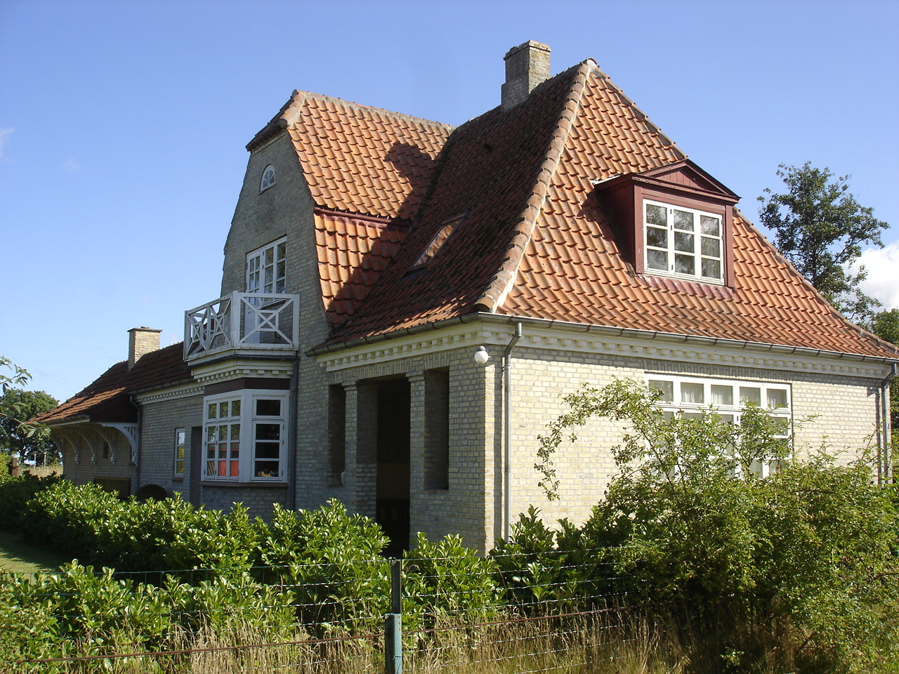 Kragenæs Station fra sporsiden